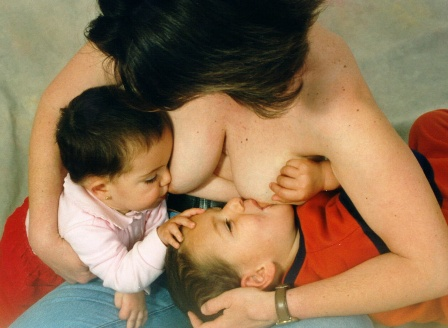 Lactancia materna